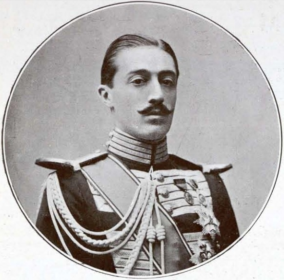 Duque de Alba. Gran Collar de Carlos III. Fotografía de Franzen